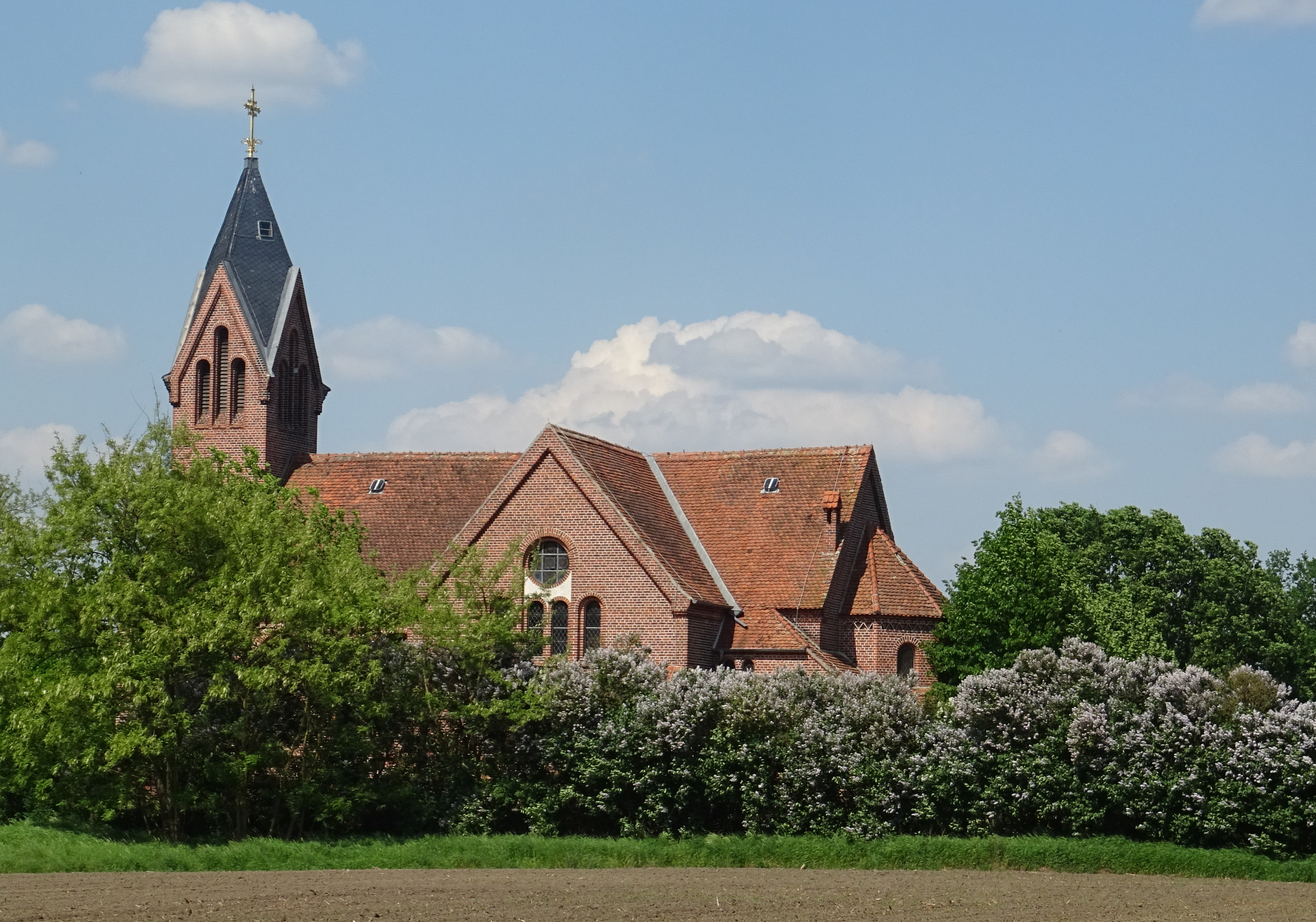 Kirche in Kietz, Gemeinde Lenzerwisch